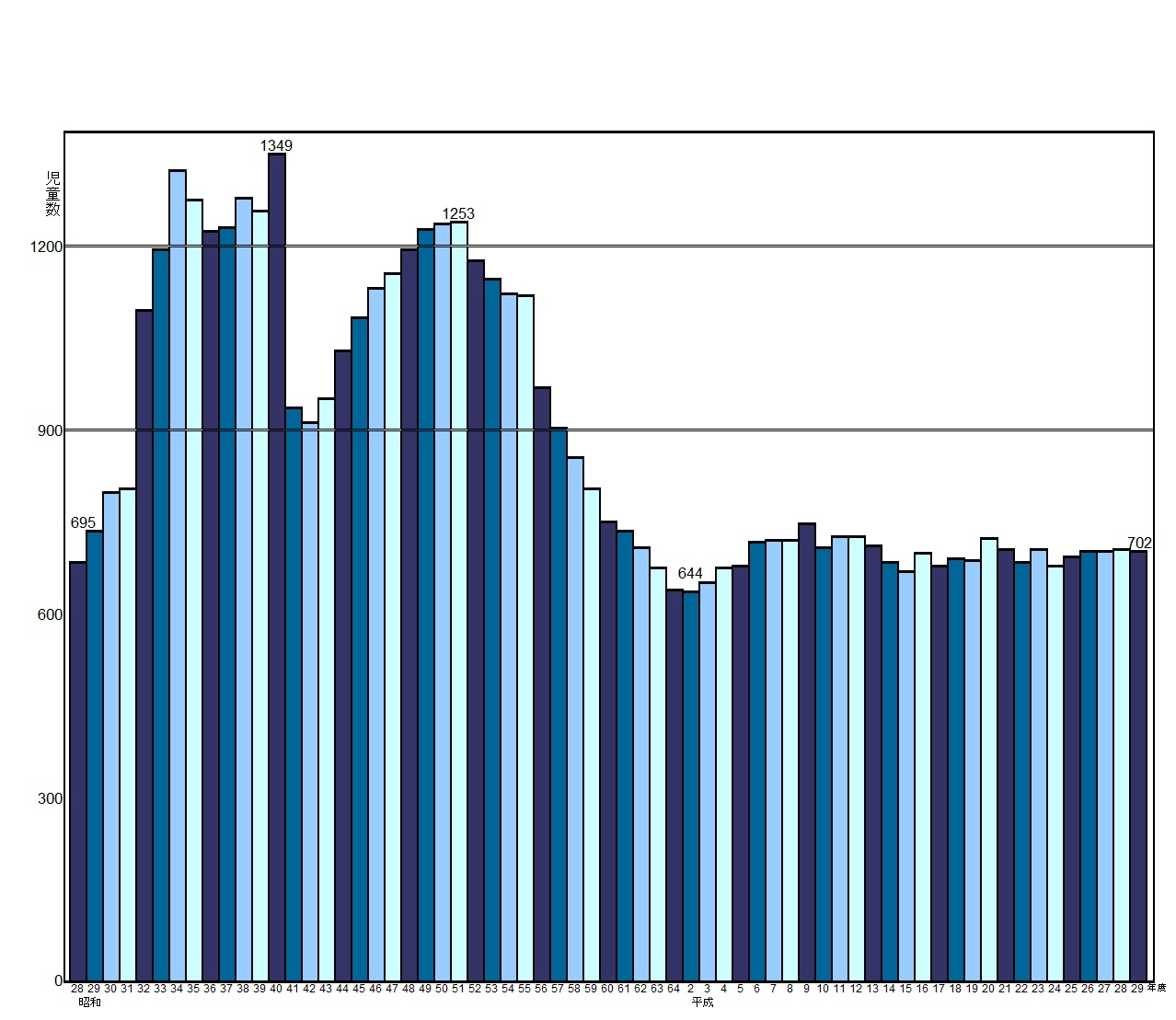 上千葉小学校の開校から平成29年度までの生徒数推移